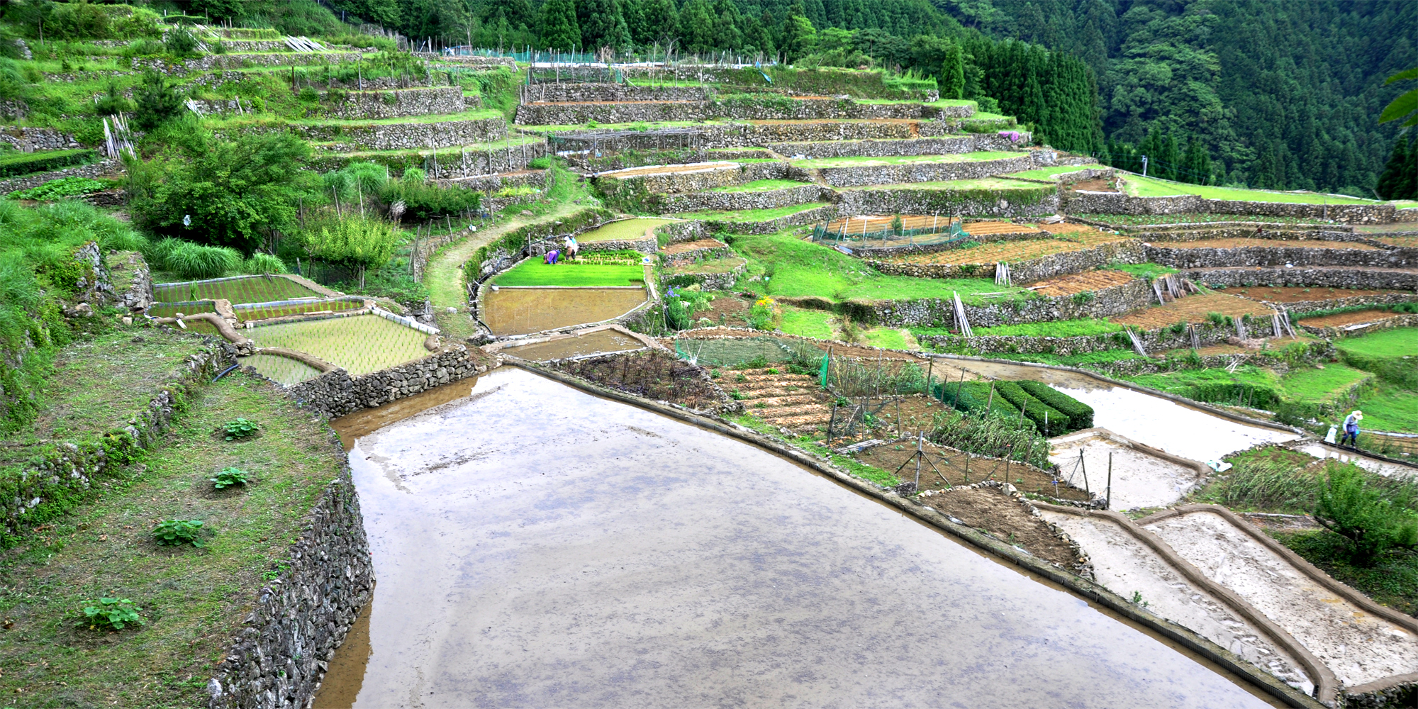 熊本県八代市の日光の棚田